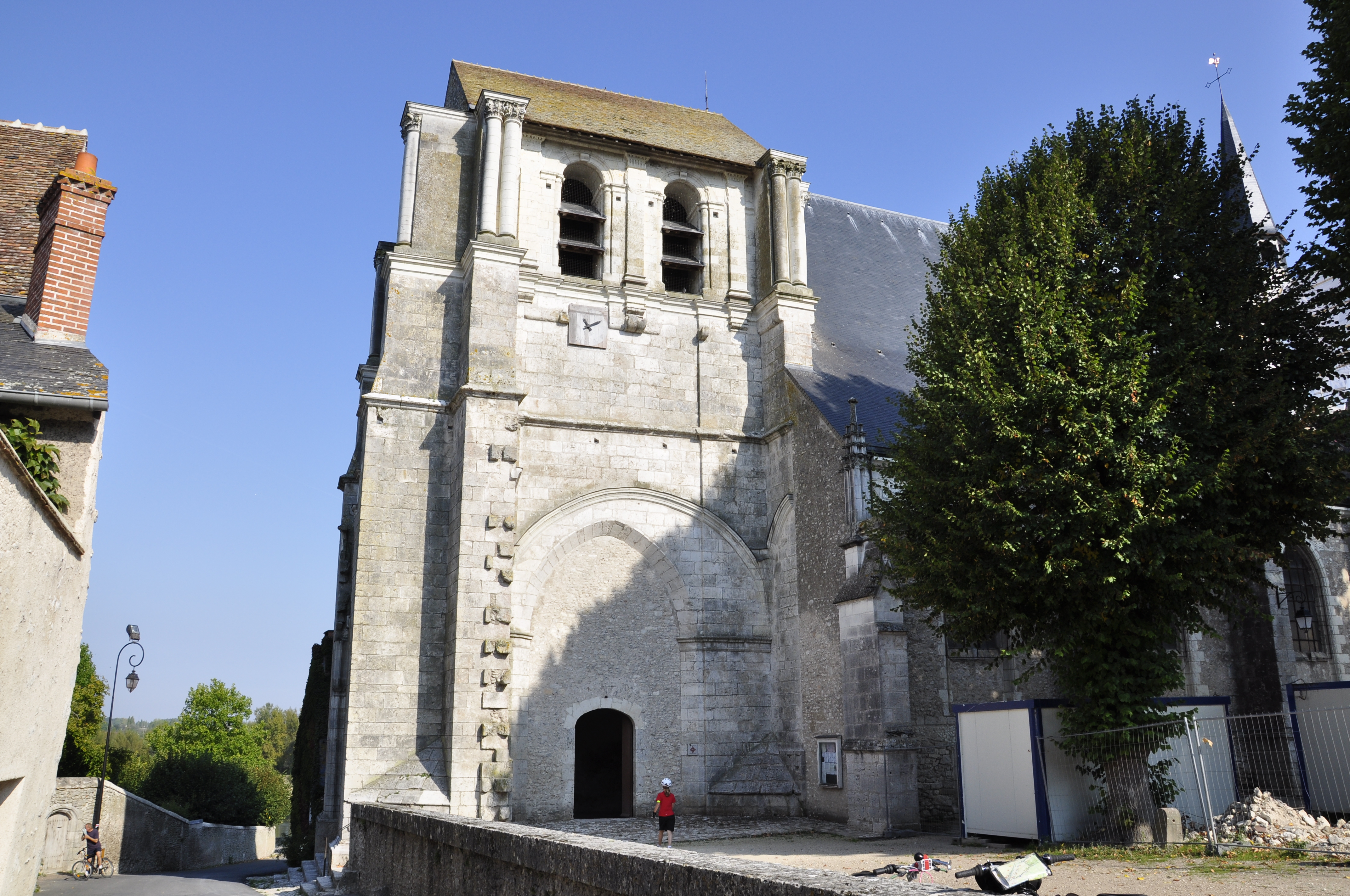 Église de Saint-Dyé-sur-Loire, vue de côté (France, Loir-et-Cher) .